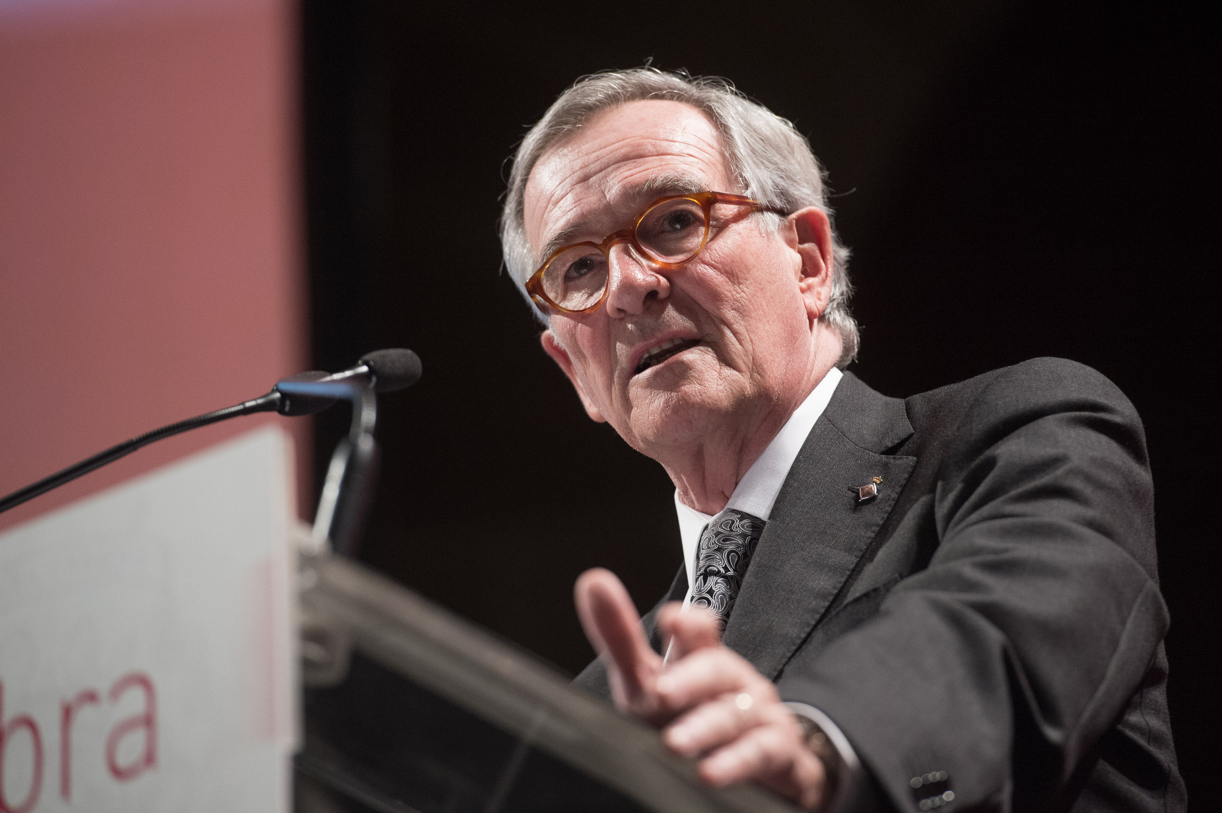 Dinar Cambra amb Xavier Trias, 23 de febrer de 2015